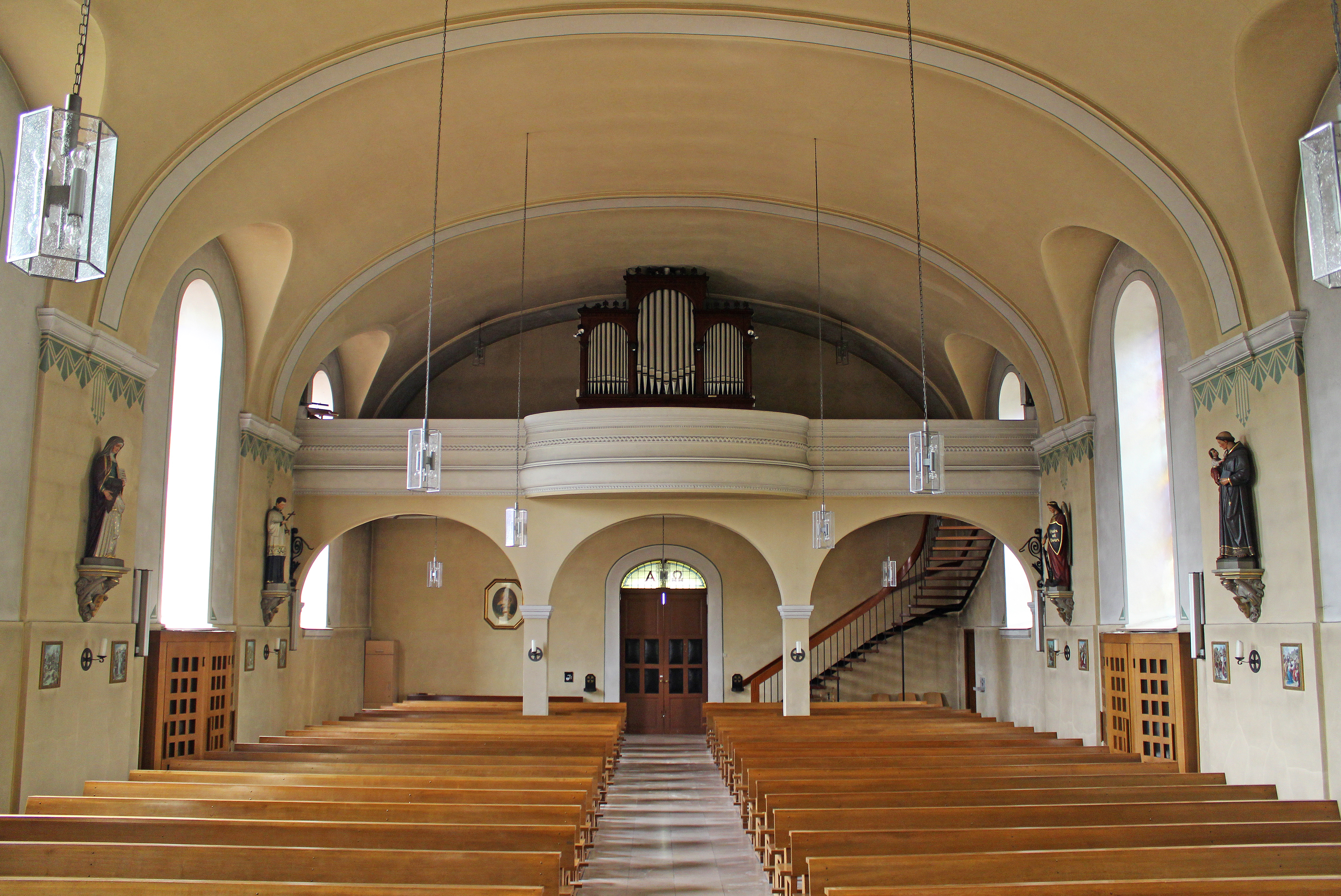 Blick ins Innere der katholischen Pfarrkirche St. Johannes der Täufer in Mondorf, einem Stadtteil von Merzig, Landkreis Merzig-Wadern, Saarland